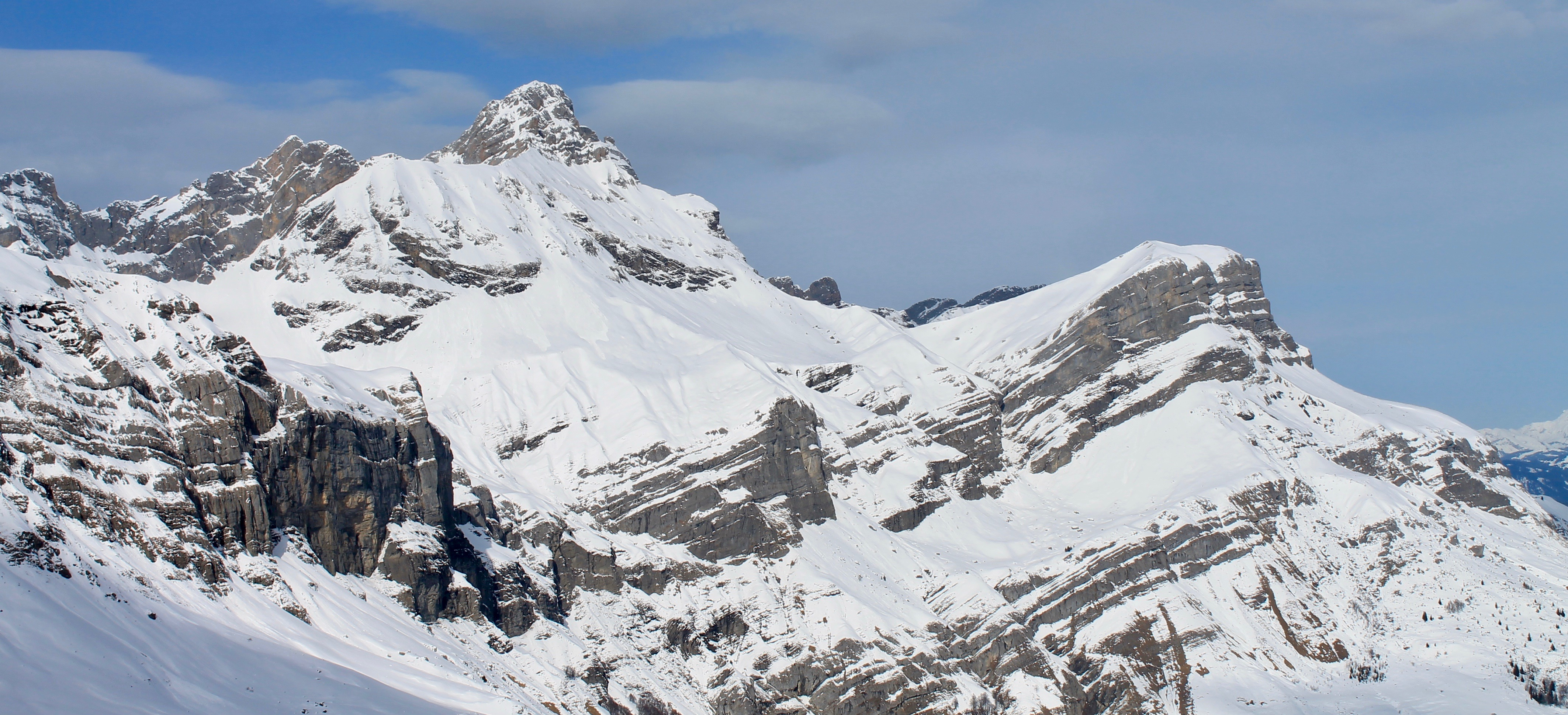 Pointe Percée, Quatre-Têtes depuis l'arrête des Bénés.